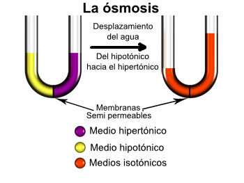 Tube à osmose avec membrane semi-perméable montrant la diffusion libre.